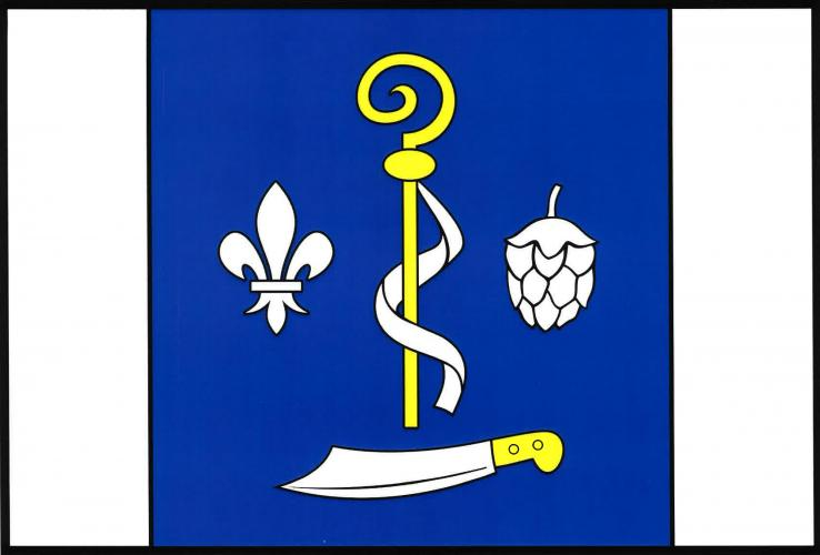 vlajka, Kvášňovice, okres Klatovy